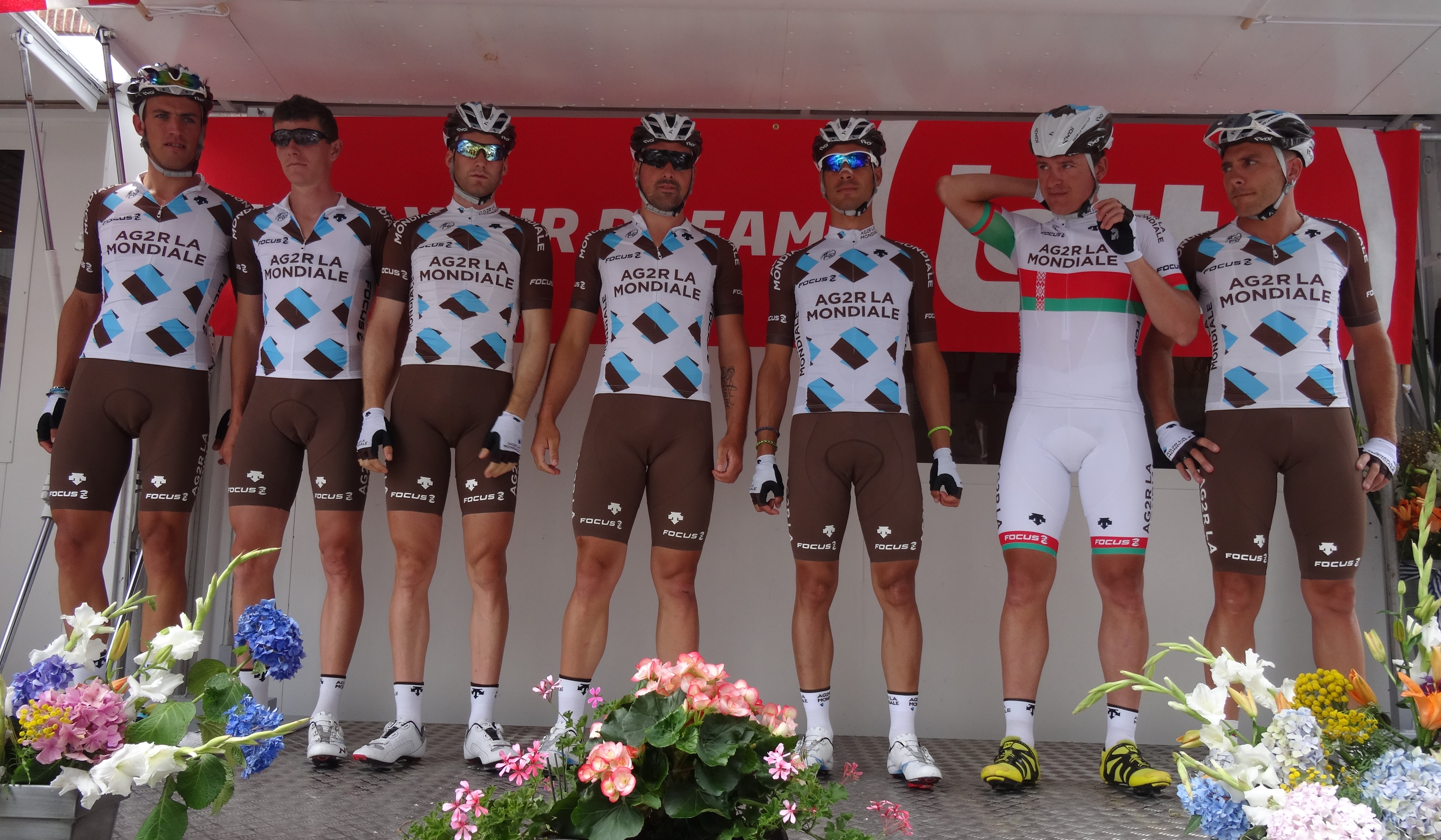 Reportage photographique réalisé le samedi 26 juillet à l'occasion du départ de la première étape du Tour de Wallonie 2014 à Frasnes-lez-Anvaing, Belgique.